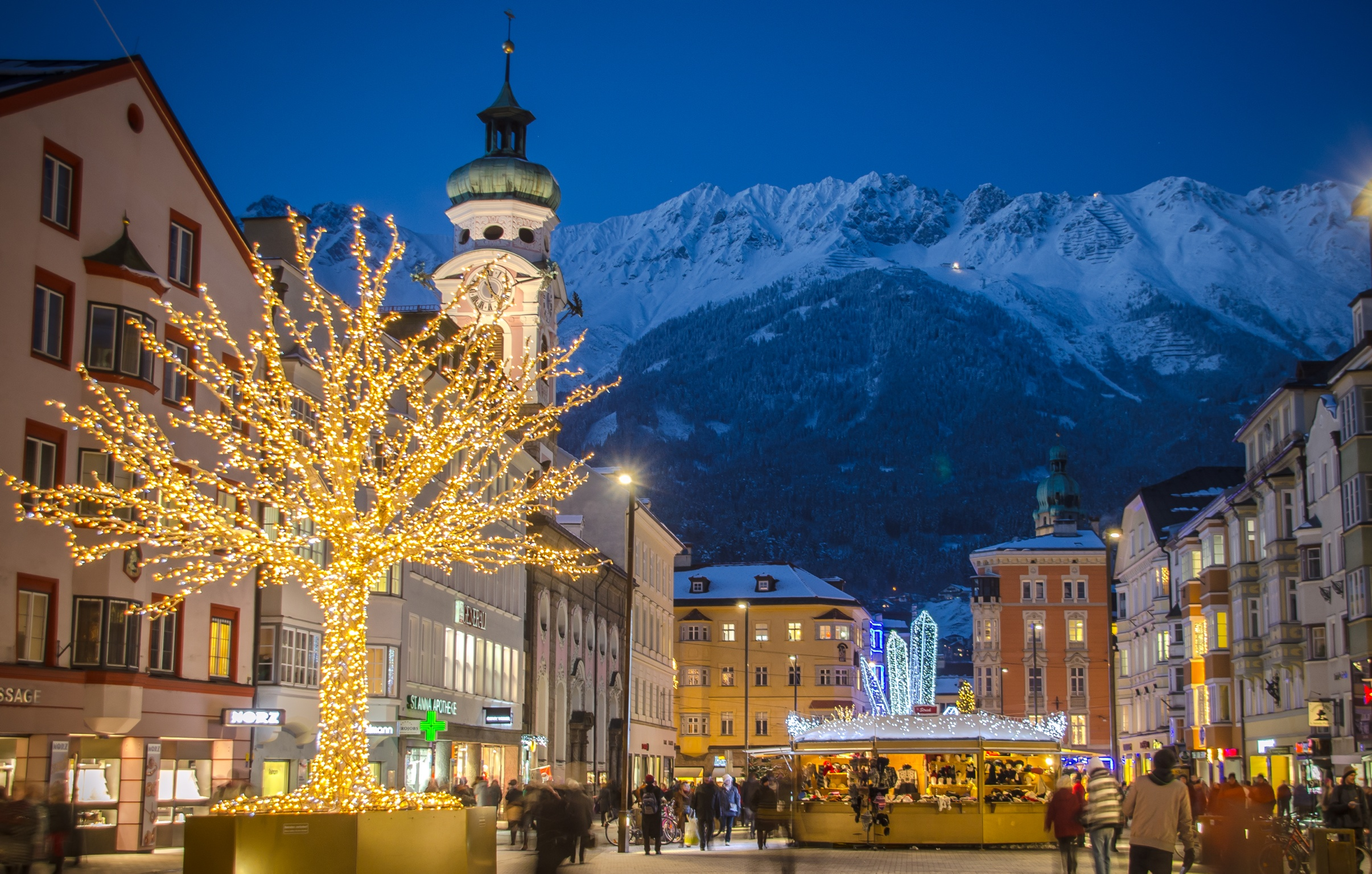 Spitalskirche zum hl. Geist